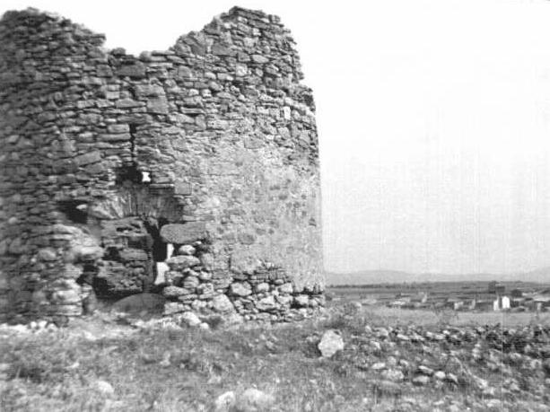 Imagen del molino de viento de Malanquilla, en 1975, antes de su reconstrucción